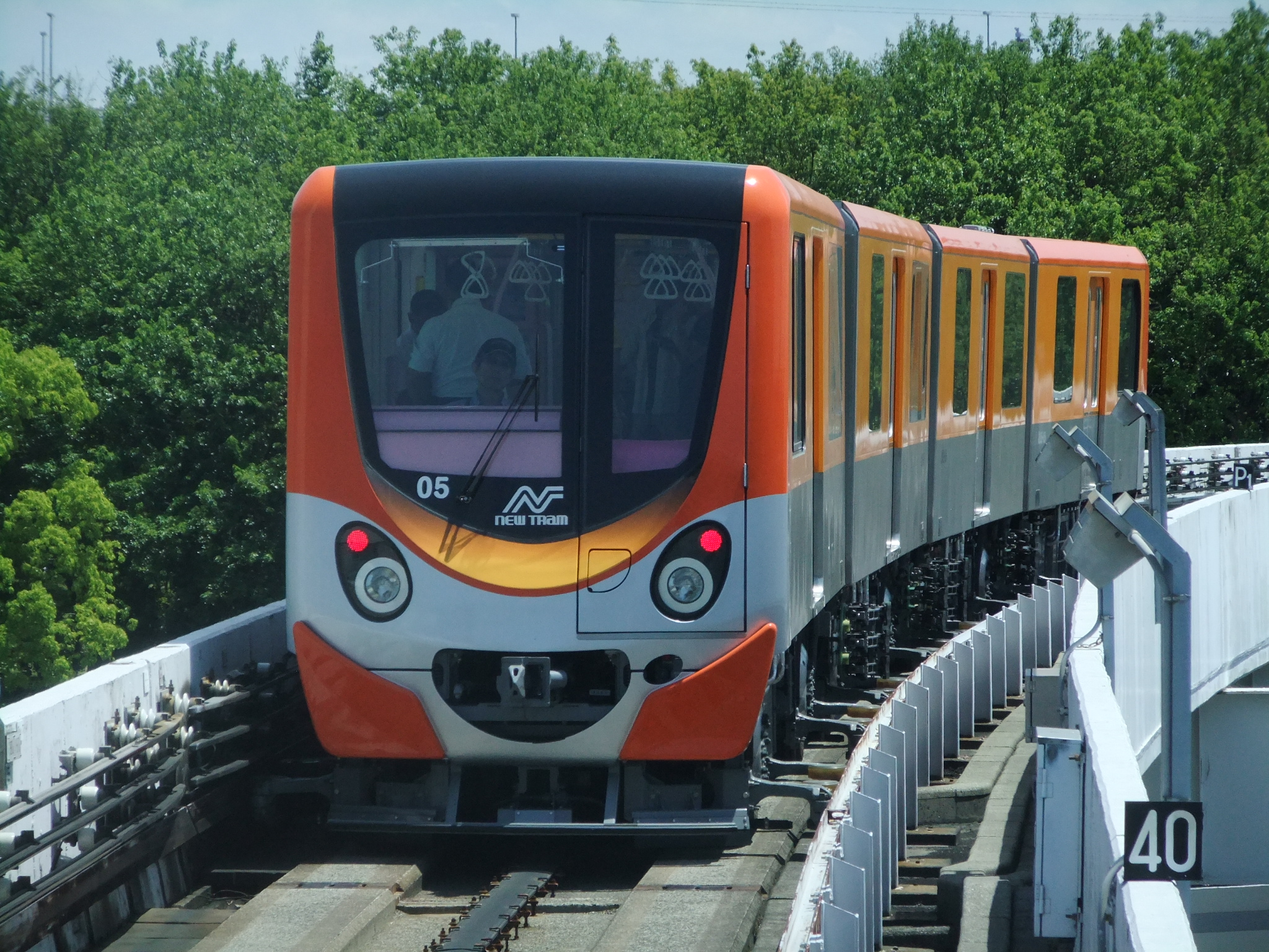 ニュートラム200系第5編成 ポートタウン東駅